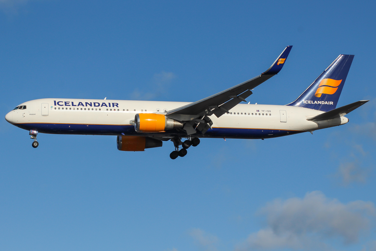 TF-ISO-2